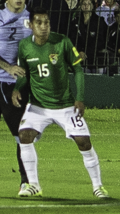 1 Fernando Muslera 22 Martín Cáceres 2 José María Giménez 3 Diego Godín C 13 Gastón Silva 4 Federico Valverde 15 Matías Vecino Falero 6 Rodrigo Bentancur 10 Giorgian De Arrascaeta 9 Luis Suárez 21 Edinson Cavani DT Óscar Tabárez Suplentes: 12 Martín Campaña 23 Esteban Conde 19 Sebastián Coates 16 Maxi Pereira 17 Egidio Arévalo Ríos 20 Alvaro González 5 Carlos Sánchez 7 Cristian Rodríguez 14 Nicolás Lodeiro 8 Jonathan Urretaviscaya 11 Christian Stuani 18 Maximiliano Gómez Camera: Canon EOS 5D Mark II 0 ISO: 1000